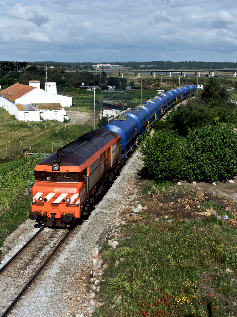 Tipo: Comboio de Transporte de Biodiesel [Alhandra - Sines] Local: Alcácer do Sal [Linha do Sul, PK 79] Data e hora: 11 de Abril de 2008 [09h45] Material: Locomotiva 1901 + 11 vagões CP Zaes